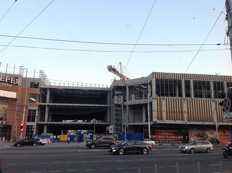 Строительство второй очереди ТРЦ "Галерея Краснодар"